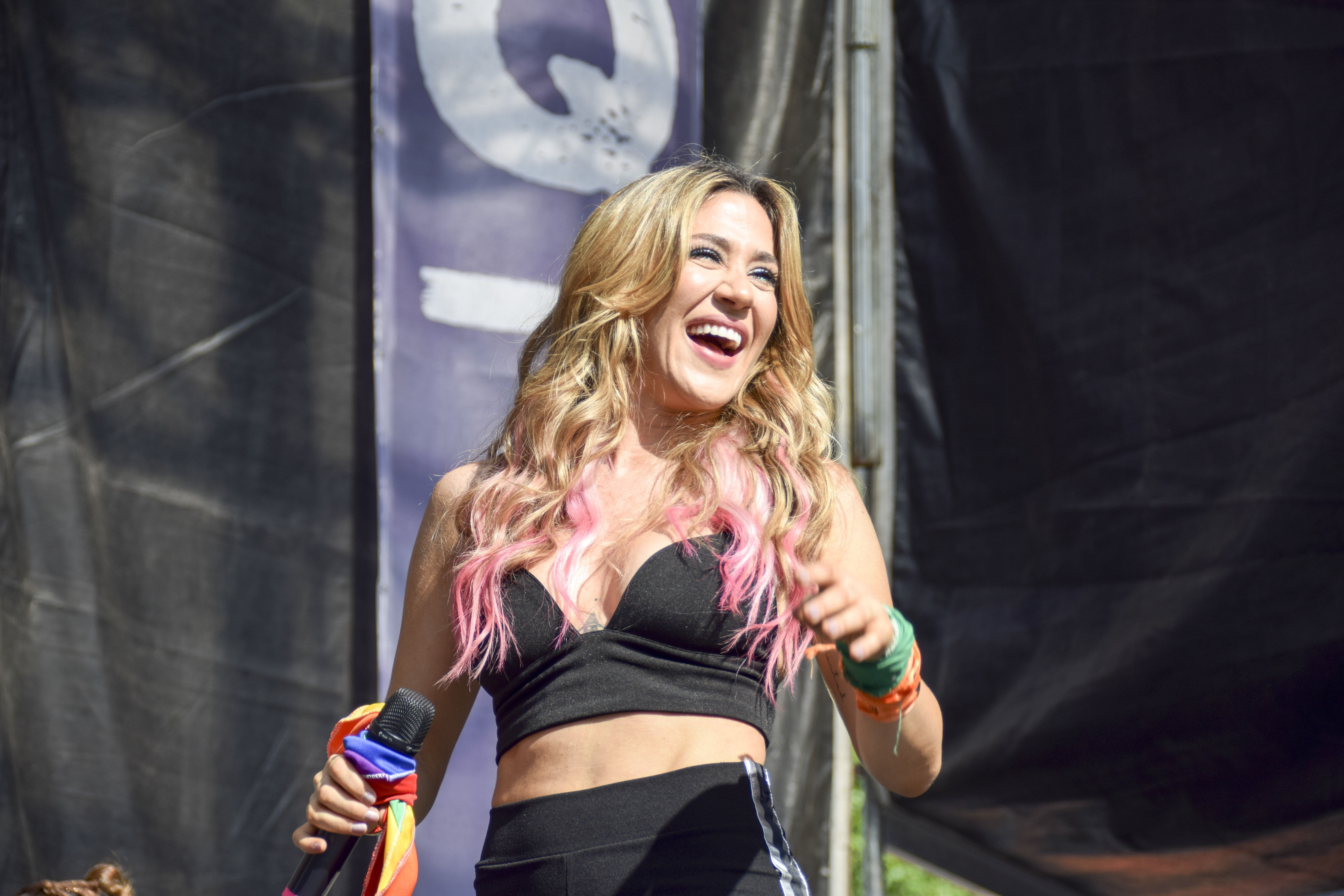 Buenos Aires, 17 de noviembre de 2018._Miles de personas celebran la 27° Marcha del orgullo LGBTIQ (Lesbianas, Gays, Bisexuales, Trans, Intersexuales y Queers) de Buenos Aires.El evento arrancó temprano el sábado con una feria en Plaza de Mayo, donde hubo shows de Mimi Maura y Jimena Barón, entre otros. Desde las 17, una caravana de carrozas marchó hasta la Plaza de los Dos Congresos. Fotos Kaloian/ Secretaría de Cultura de la Nación.